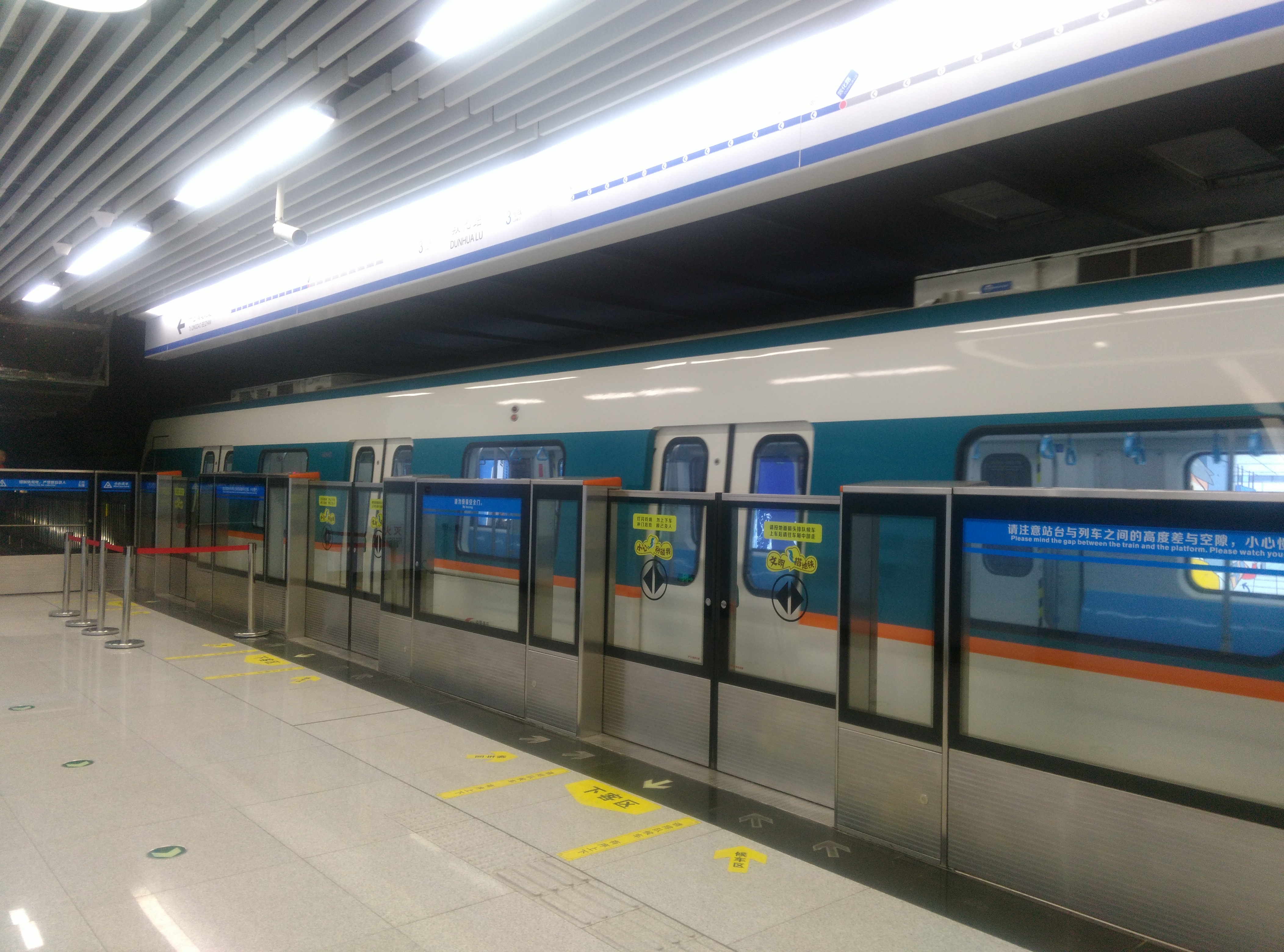 敦化路站上行站台